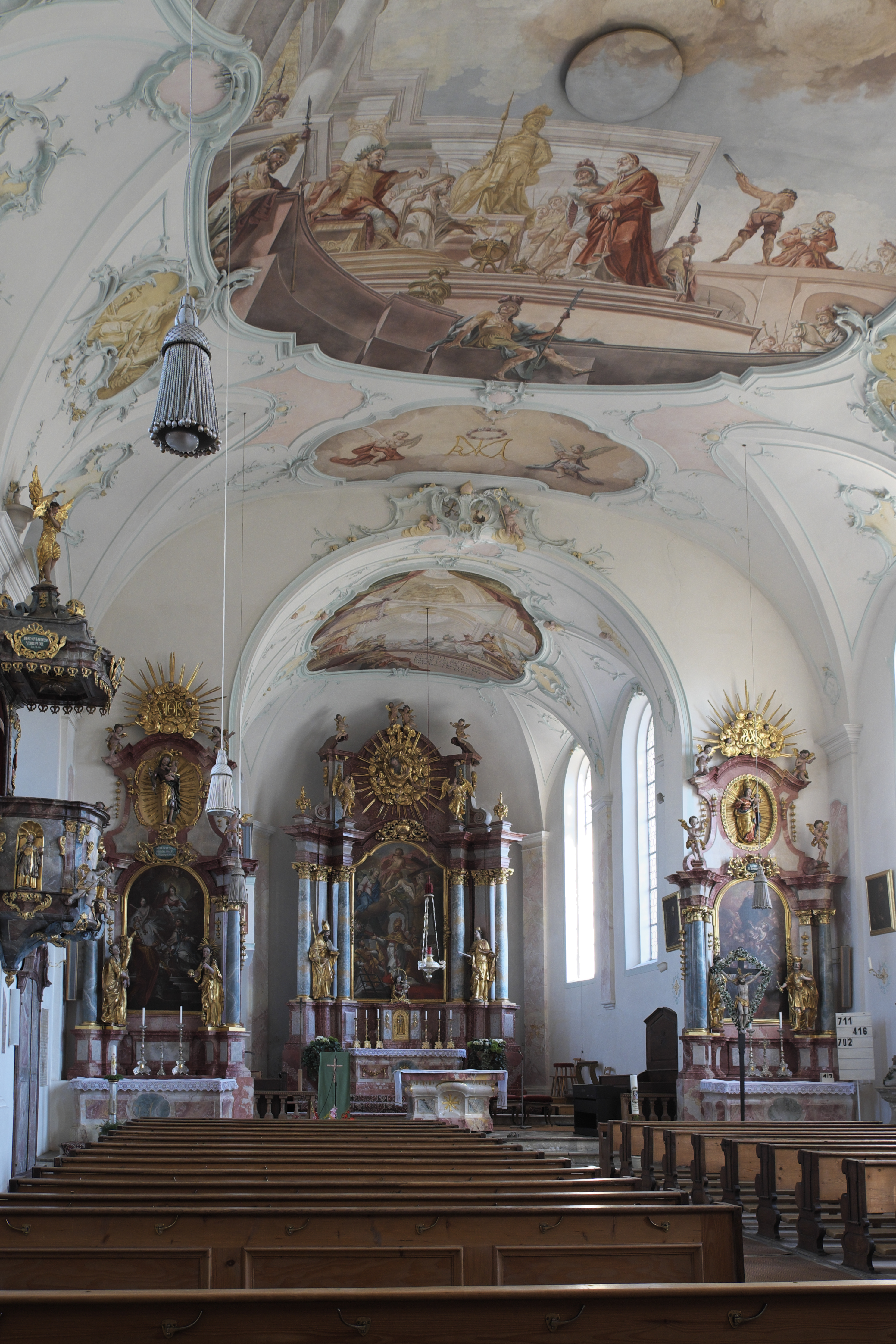 Katholische Pfarrkirche St. Sixtus in Moorenweis im Landkreis Fürstenfeldbruck (Bayern/Deutschland), Innenraum